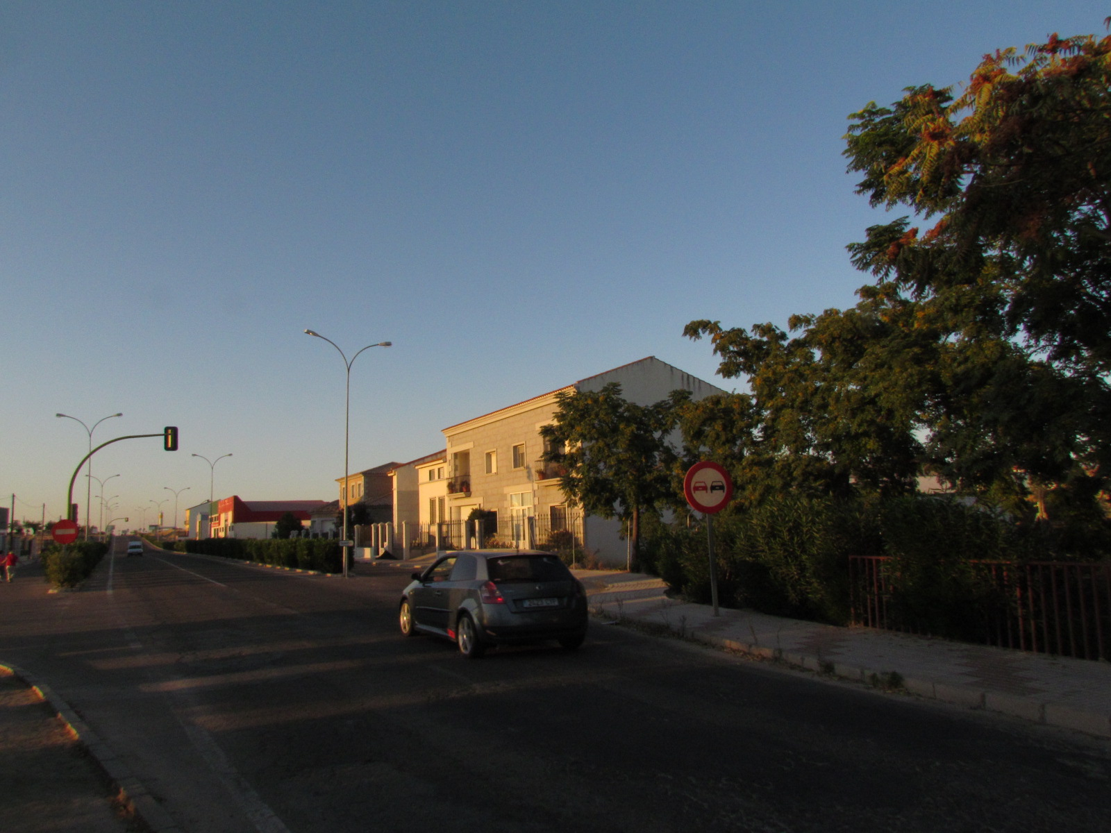 La EX346 al paso por Quintana de la Serena (sobre el KM10-11)